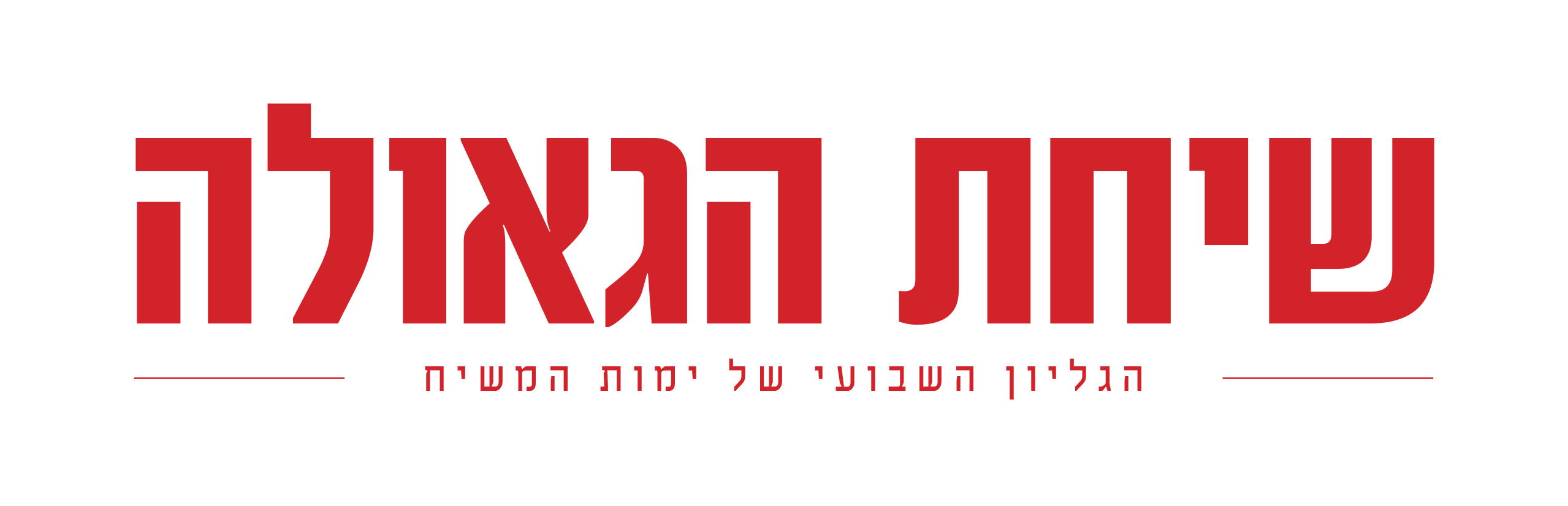 לוגו העיתון